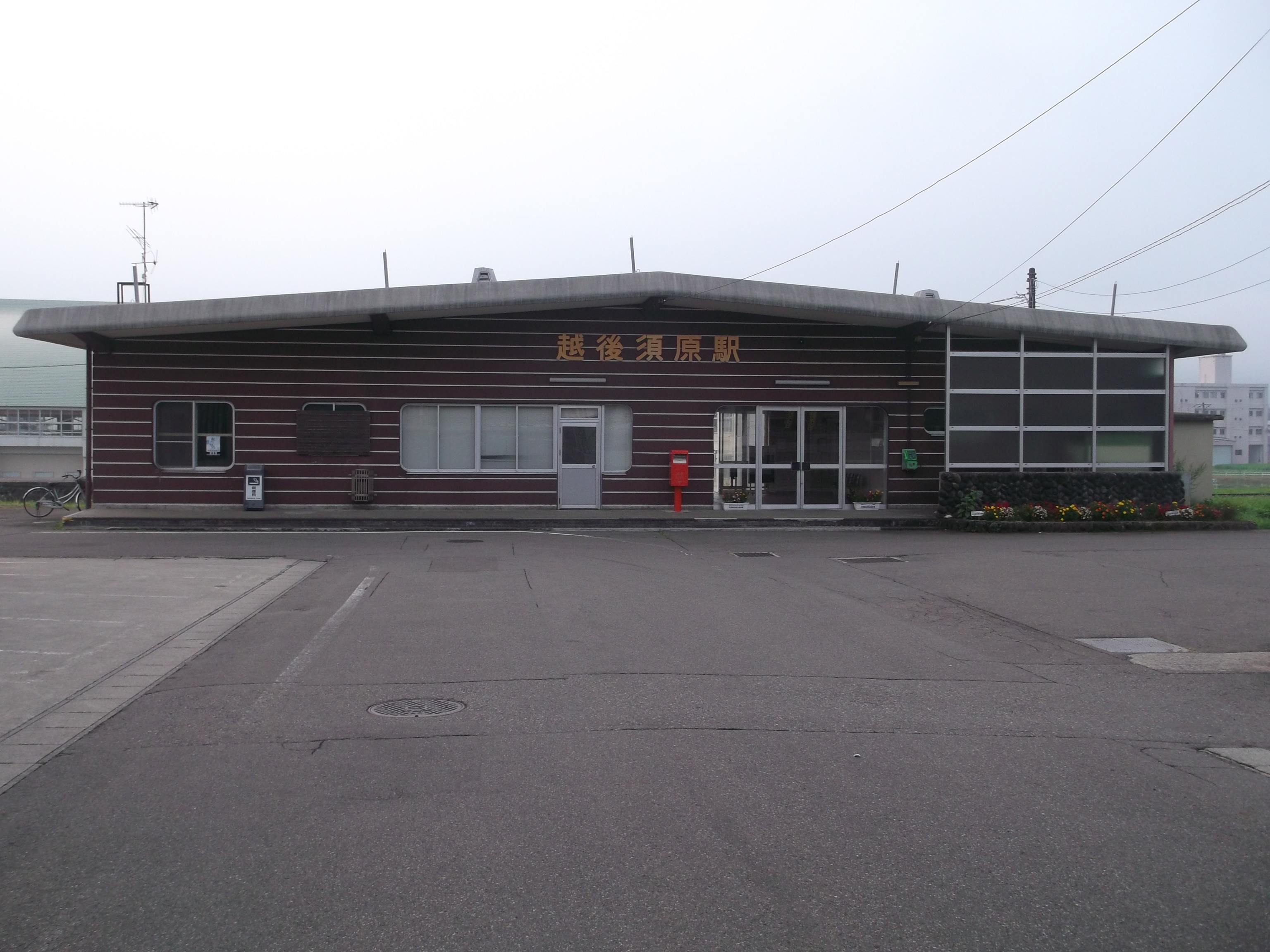 JR只見線 越後須原駅駅舎